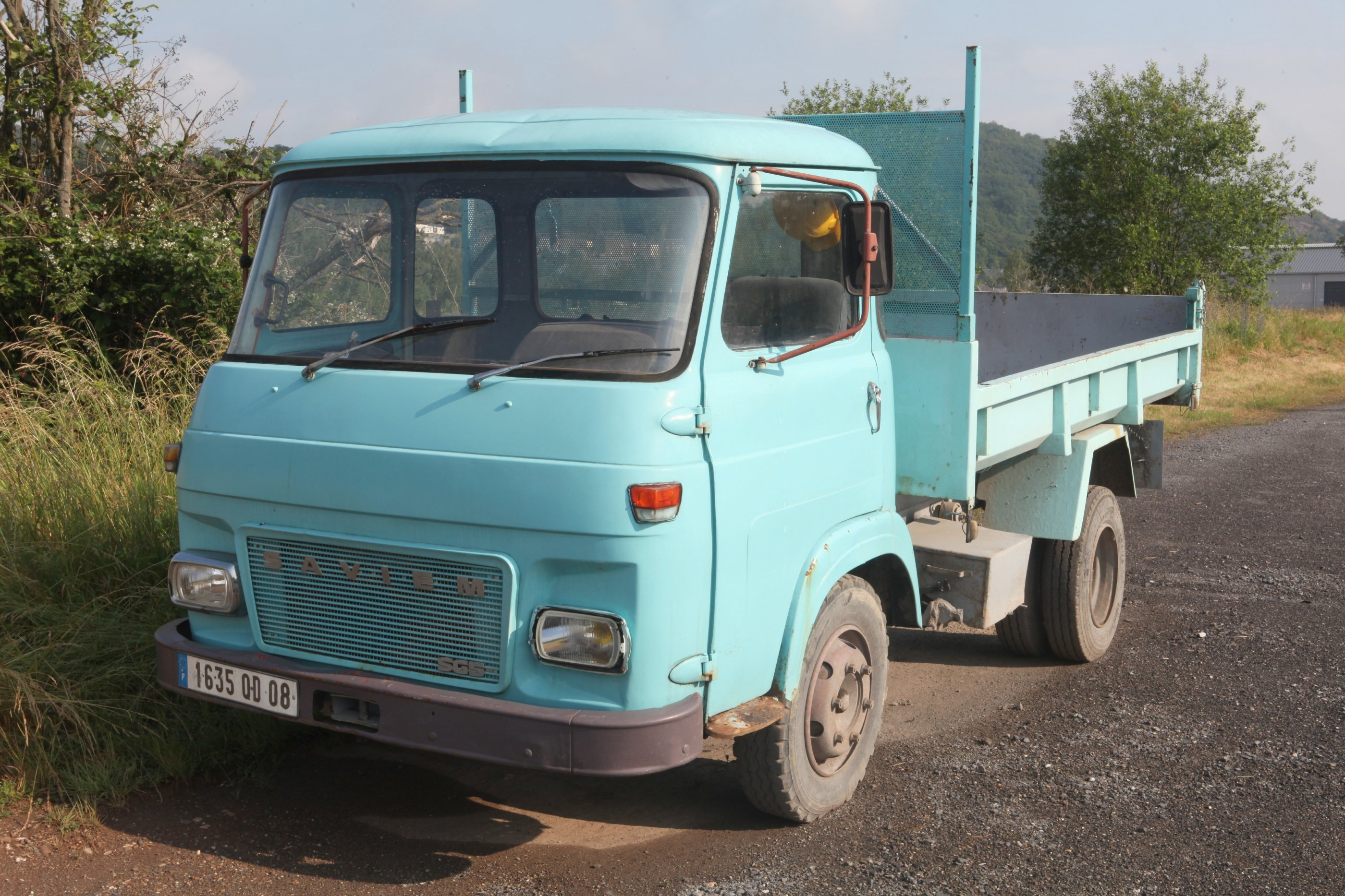 Saviem SG 5